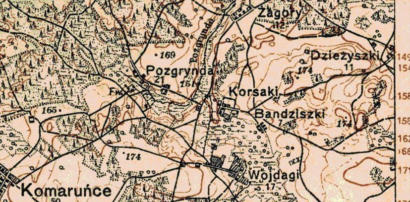 Pasgrindos kaimas ir jo apylinkės. Ištrauka iš lenkų okupuoto Vilniaus krašto 1927 m. žemėlapio (šaltinis